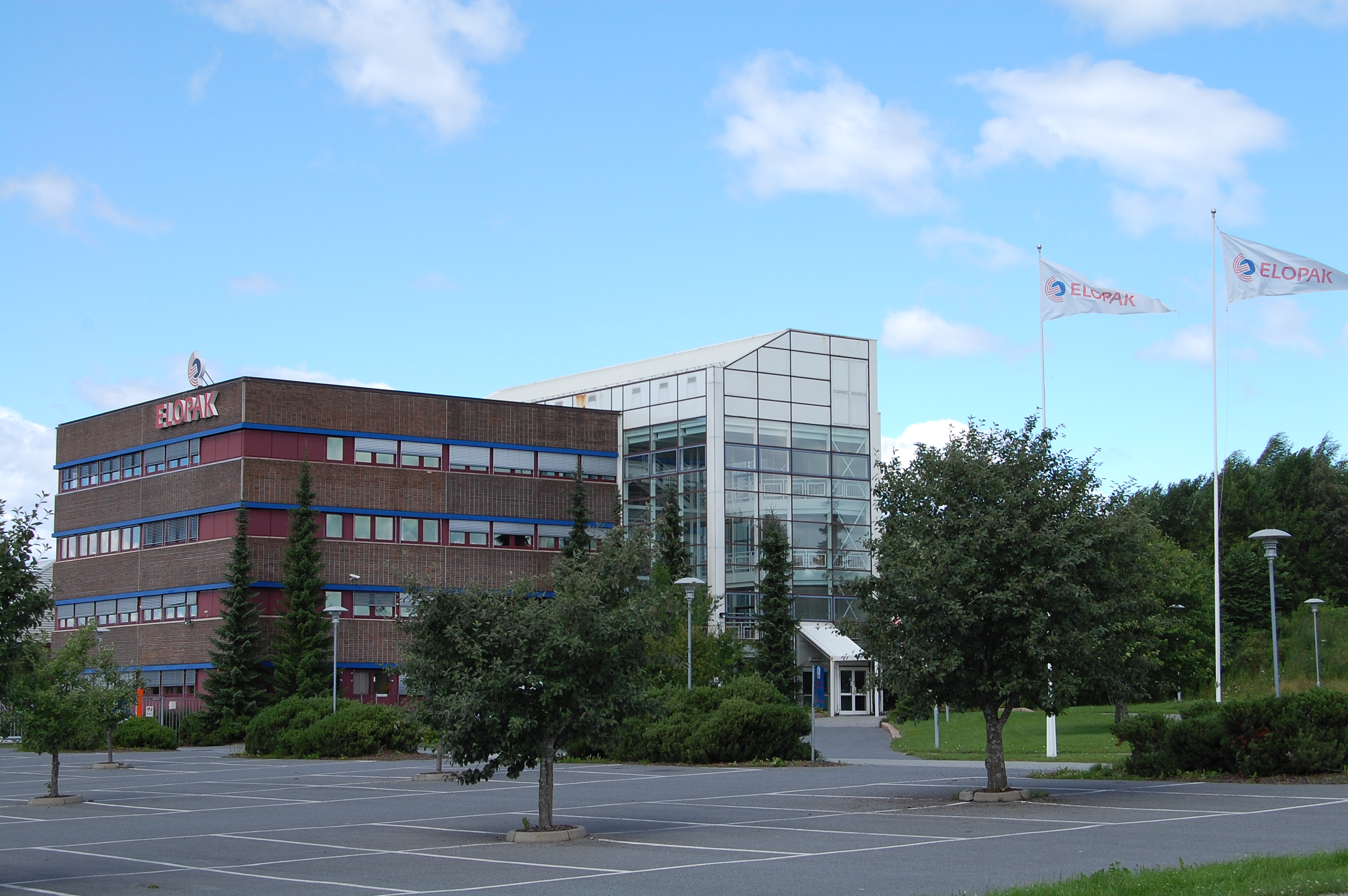 Elopaks bygg ppå Spikkestad